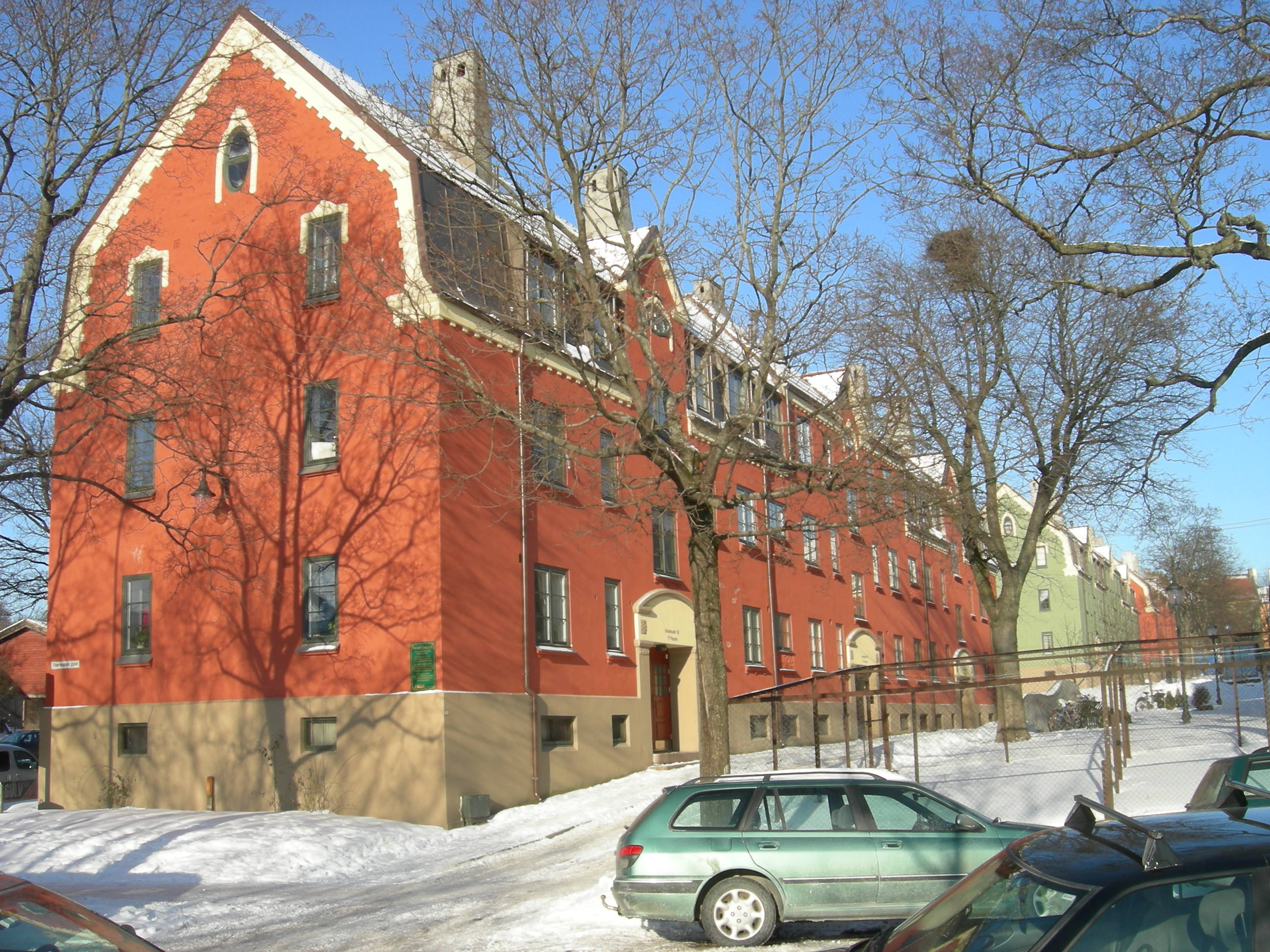 Det Rivertzke kvartal, Sagene Oslo, Norway